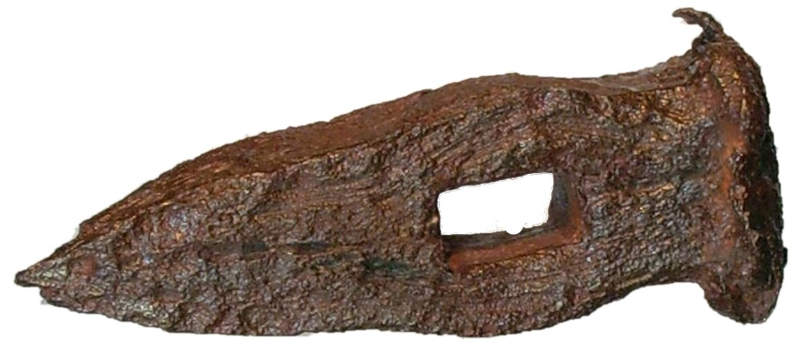 Schlägel aus dem Quecksilberbergbau Mörsdorf im Hunsrück